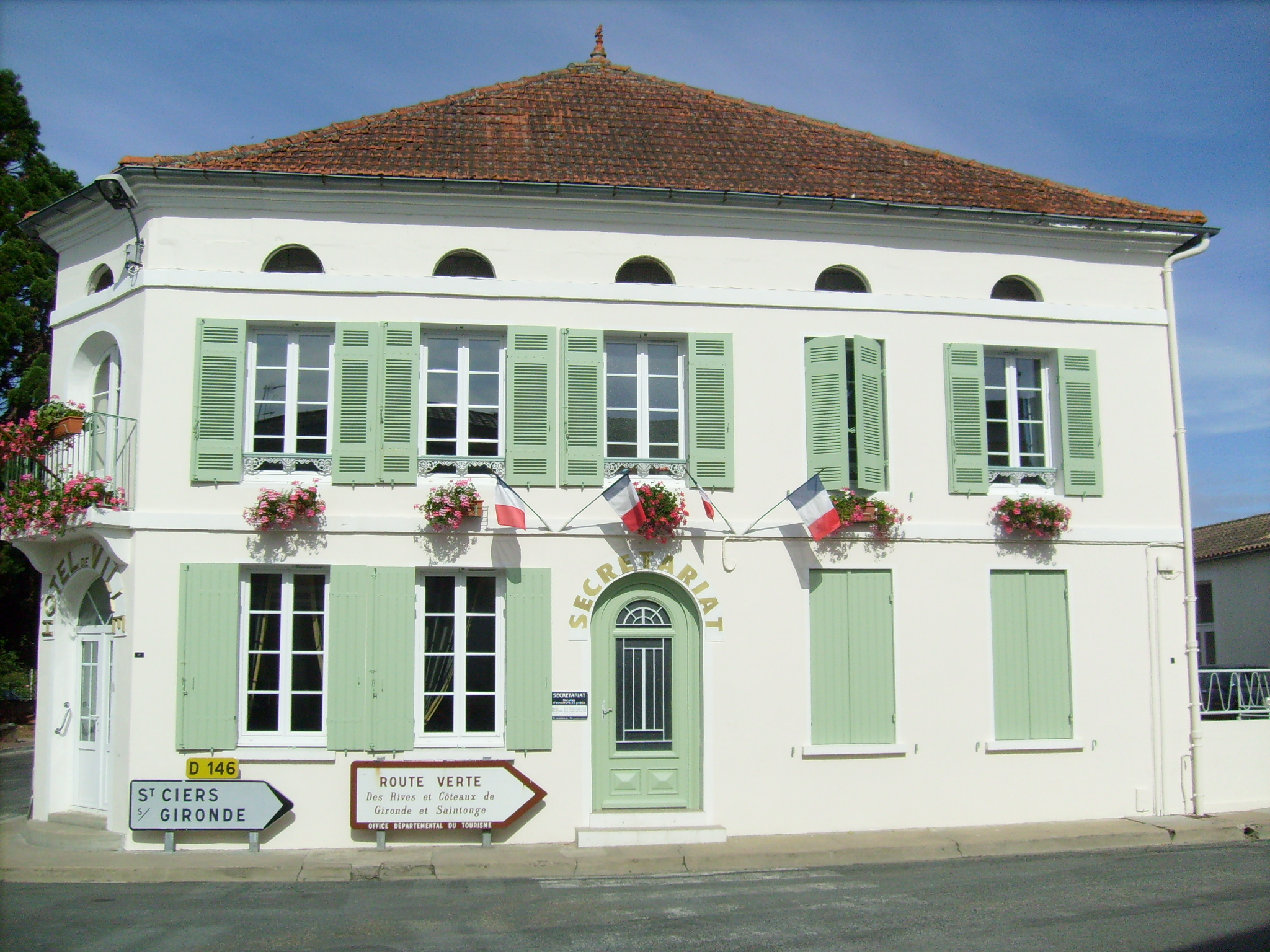 Mairie de Saint-Bonnet-sur-Gironde